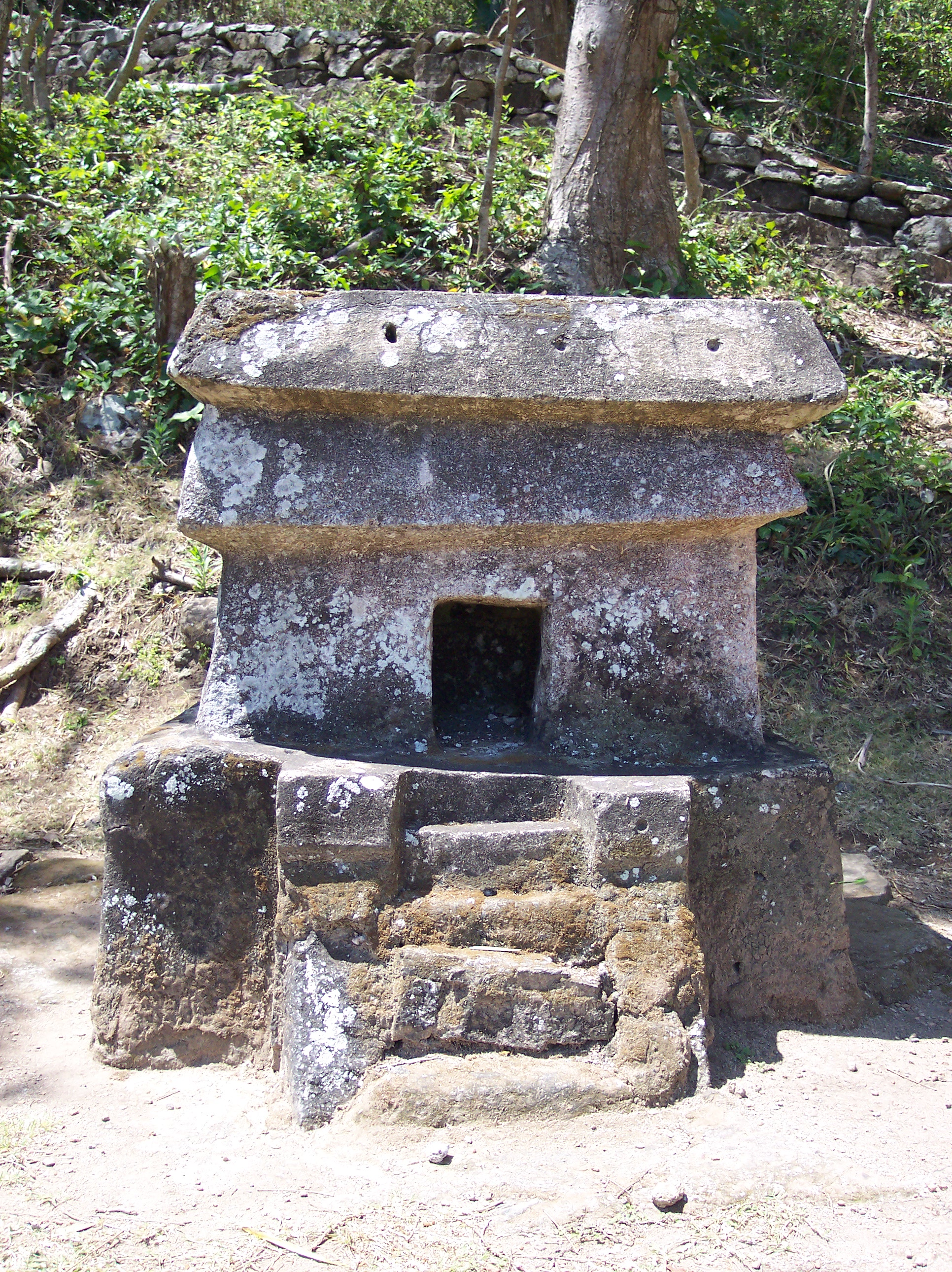 A close up of a tomb. Note: Details about the photo are pending. SPANISH: Una tumba de cerca. Archeological Site Quiahuiztlan. Located in the Actopan Municipality, Estate of Veracruz, Mexico. SPANISH: Sitio Arqueológico Quiahuiztlán, Localizado en el Municipio de Actopan, Estado de Veracruz, México.